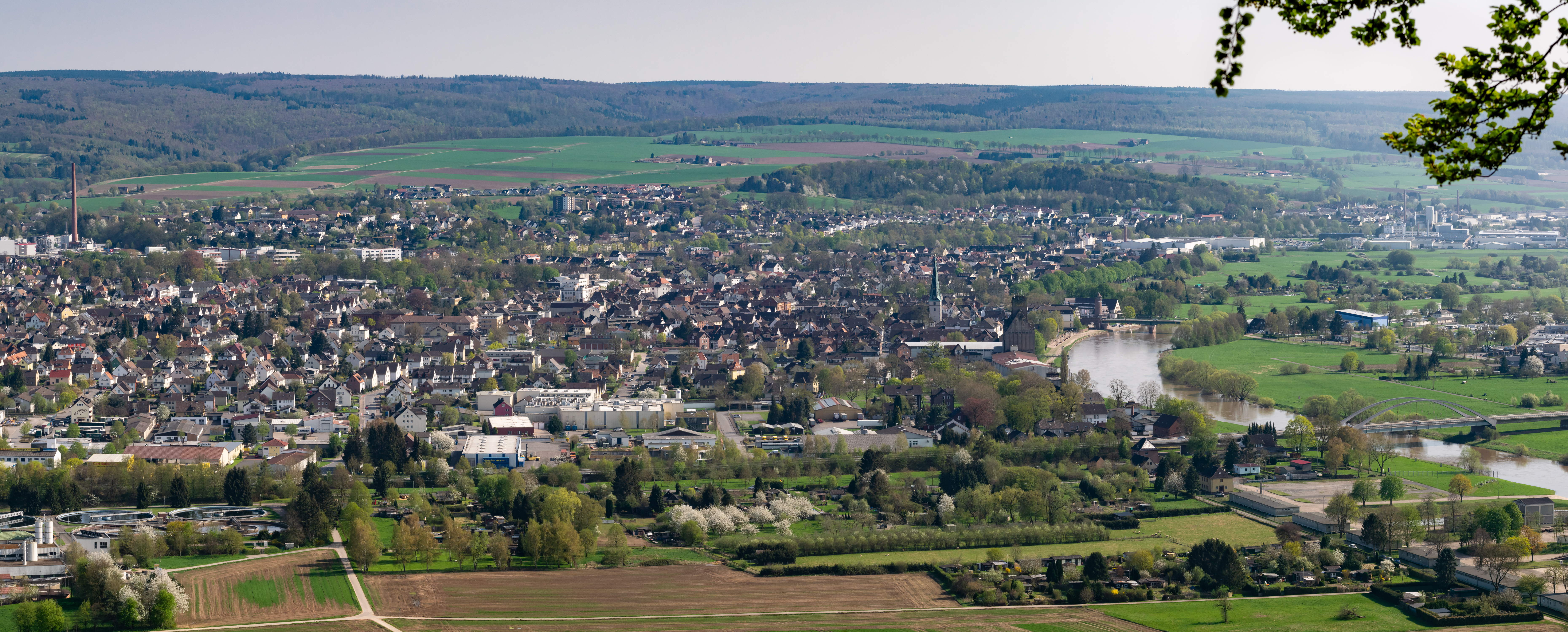 Blick vom Kiekenstein (Höxter-Stahle) über die Weser auf Holzminden